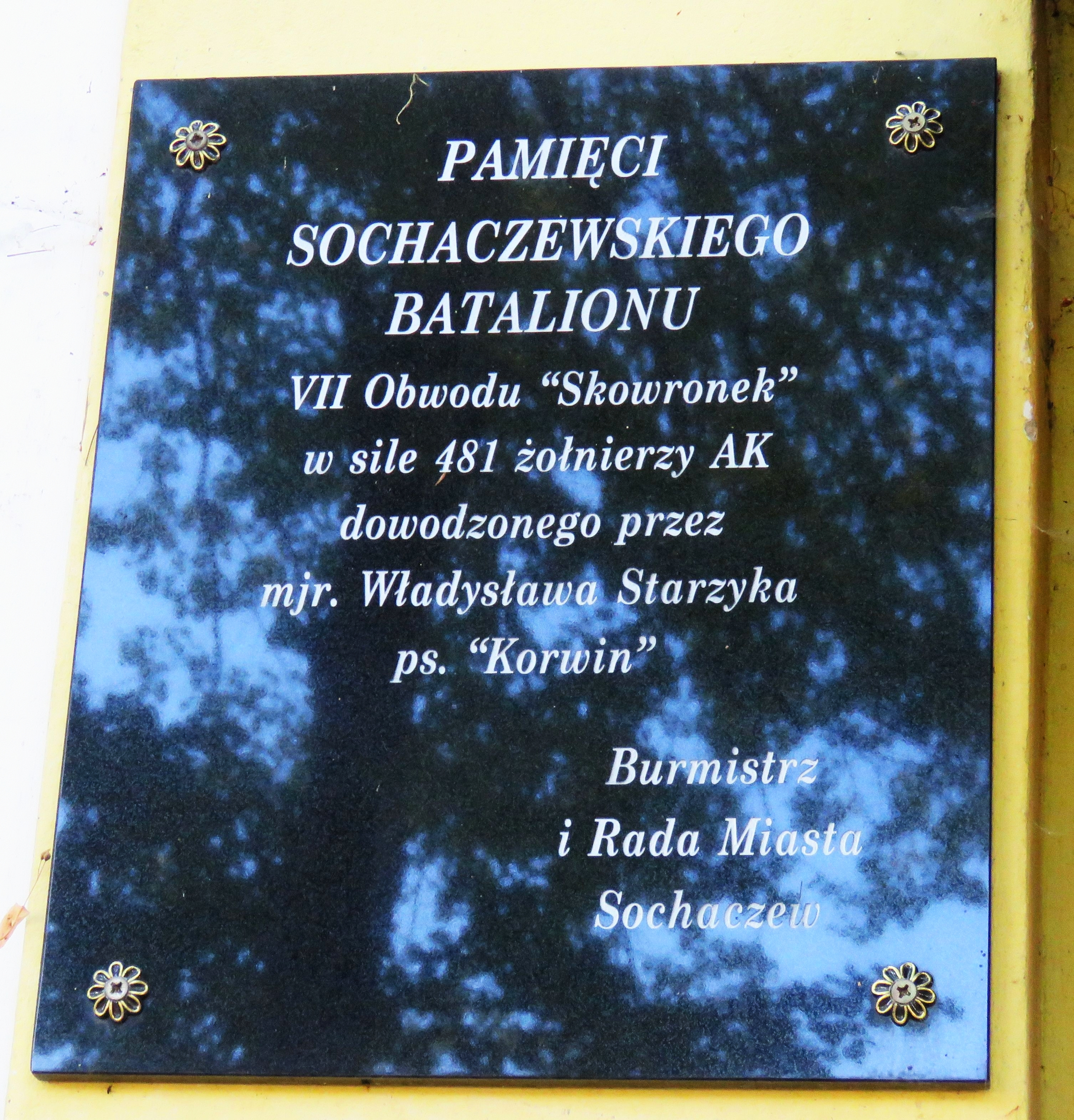 WIERSZE Kościół p.w. Św. Maksymiliana Marii Kolbe TABLICA NA KOŚCIELE 14